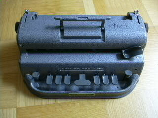 Perkins-Brailler zum schreiben von Punktschrift für blinde Menschen